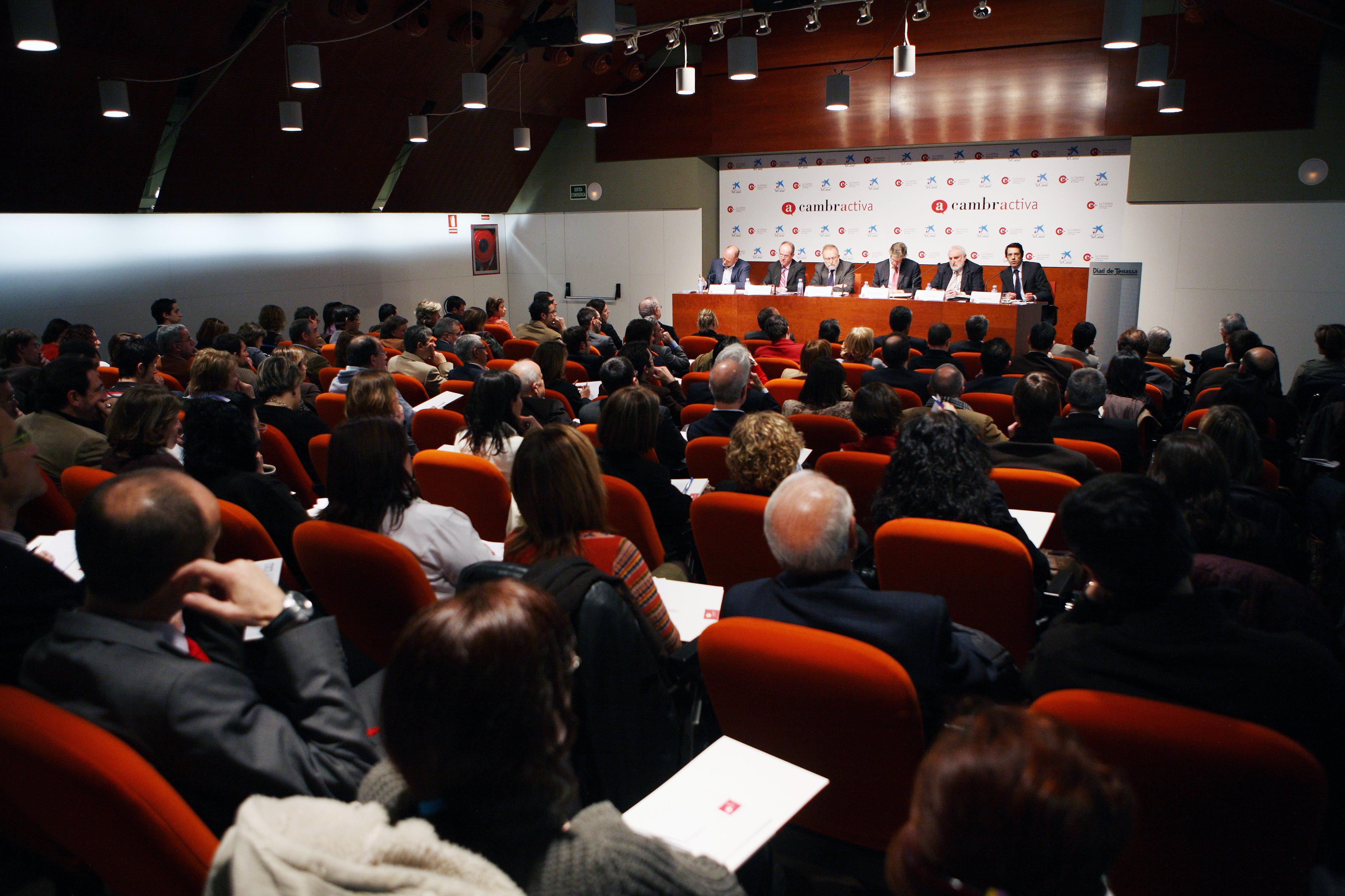 Sesión de Cambractiva en la Cámara de Comercio e Indústria de Tarrasa